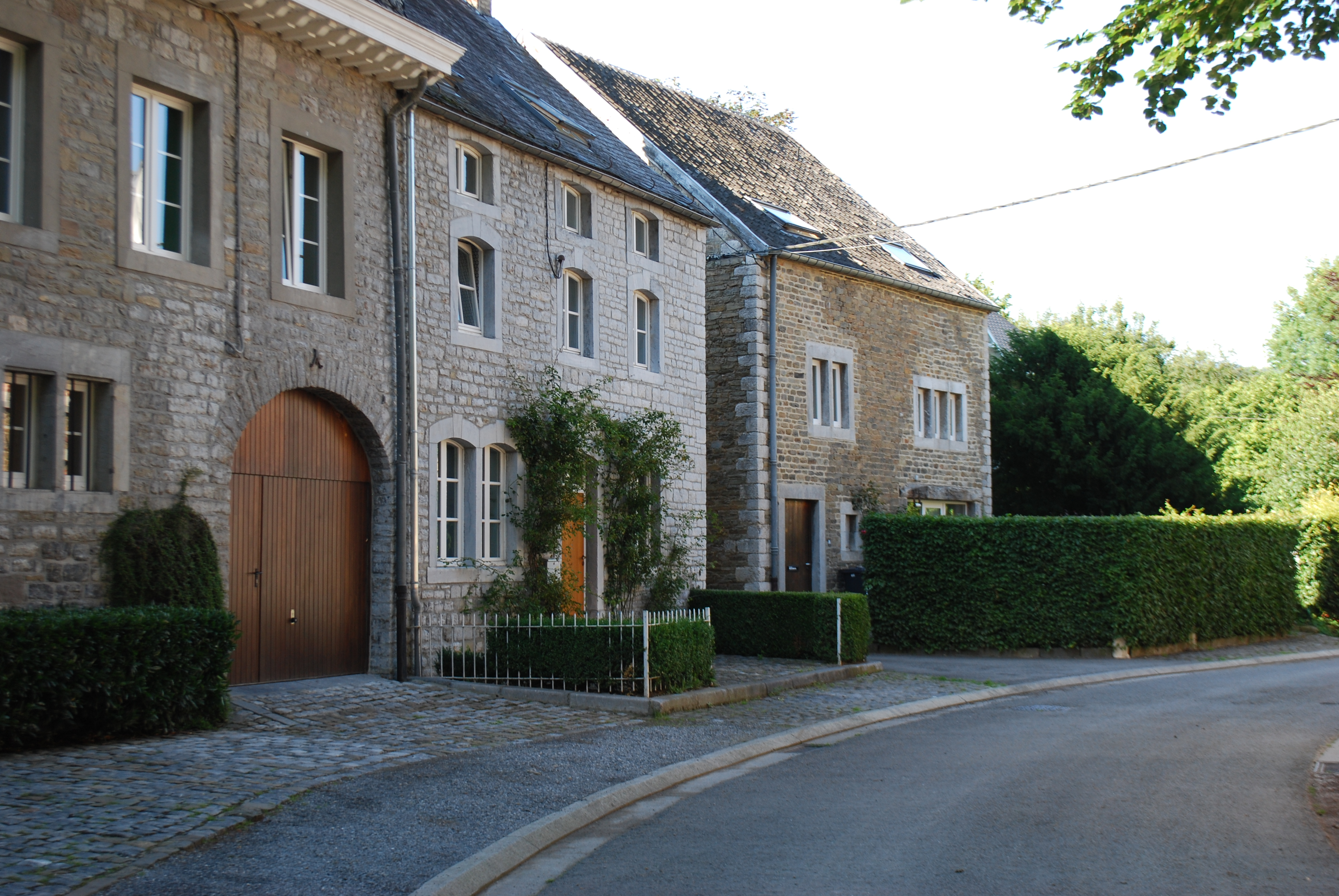 Maisons dans le chemin du Passage, à Hony (Esneux).